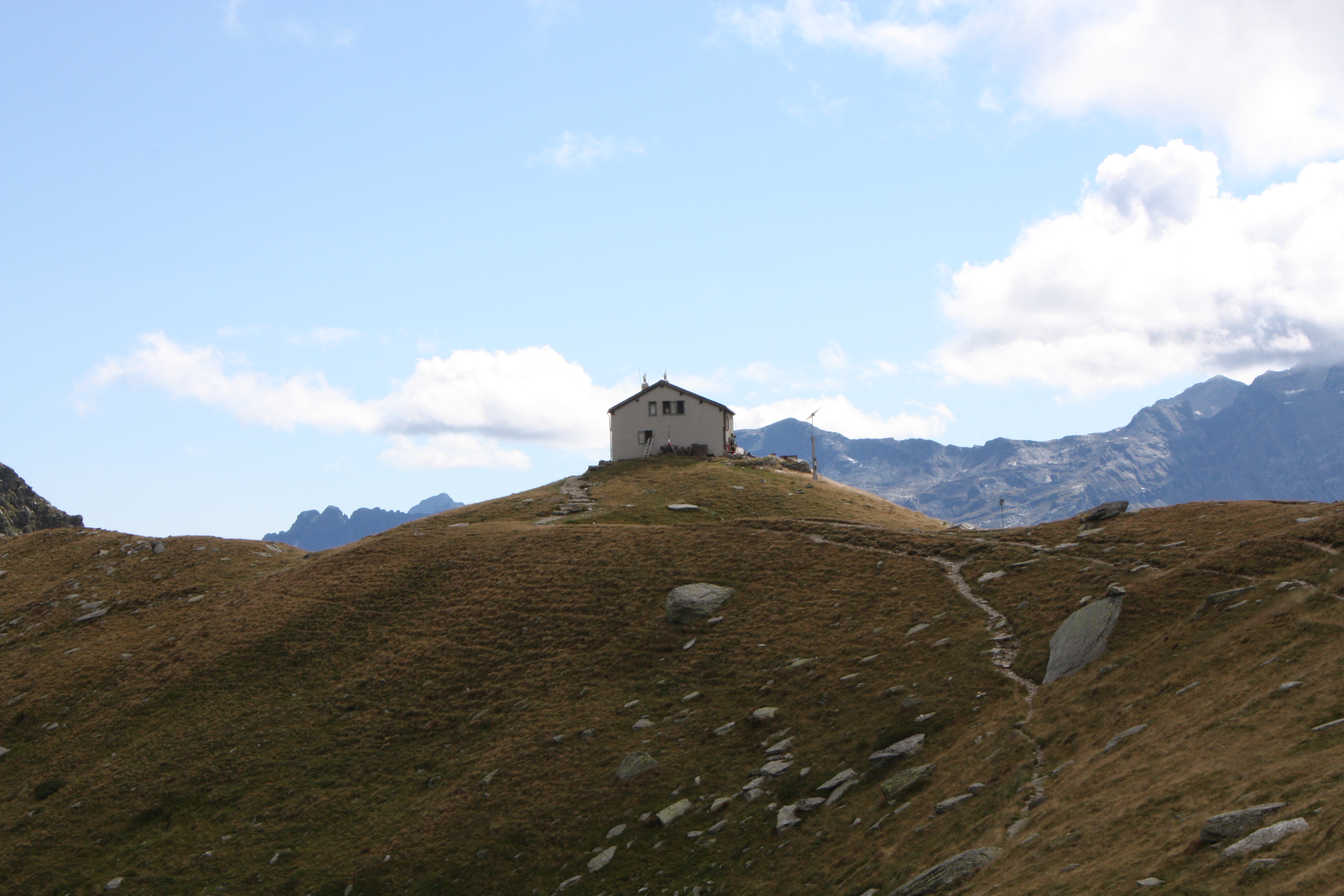 Rifugio Bertacchi ripreso dal sentiero verso il Passo di Emet